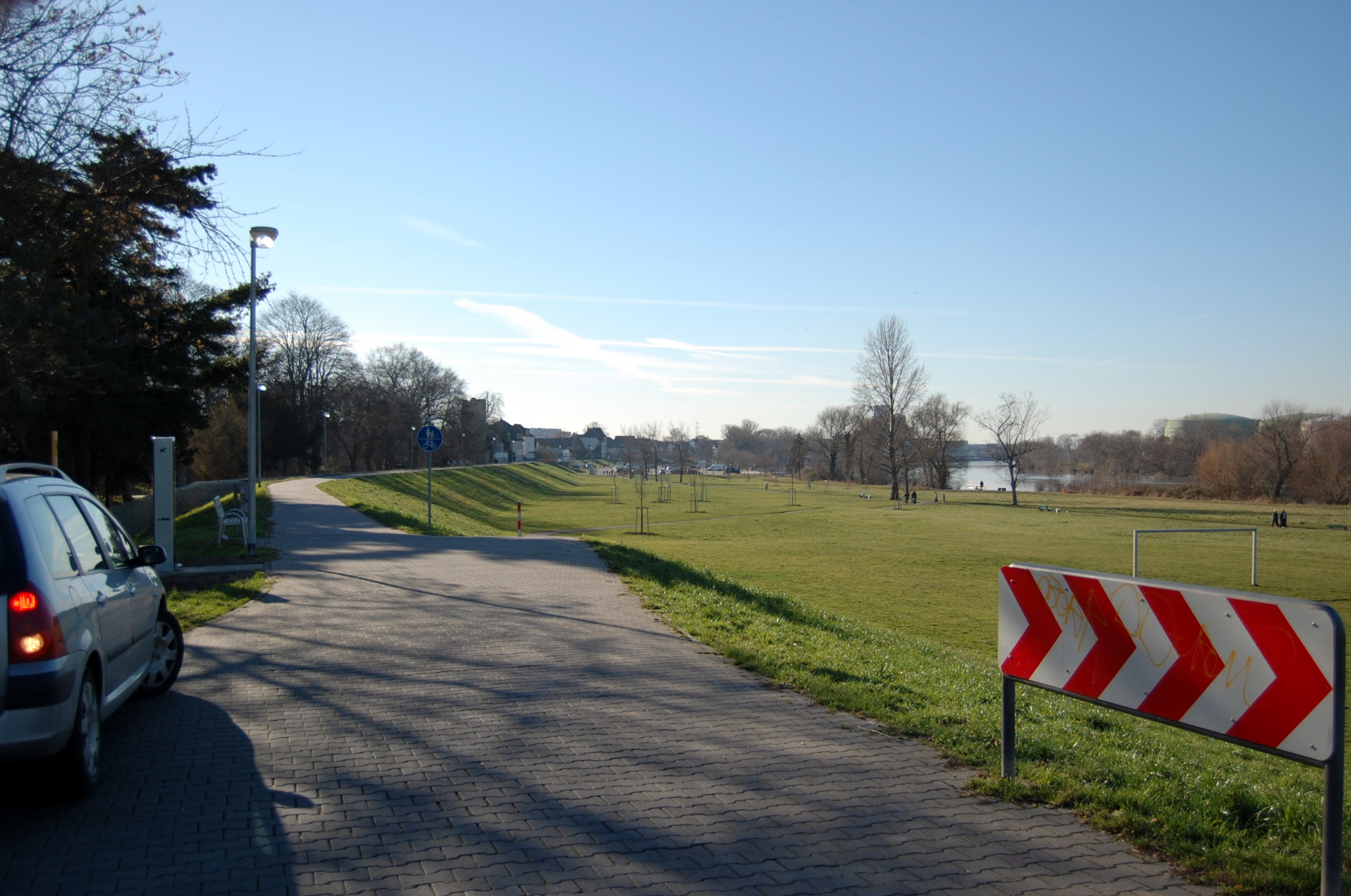 Mainwiesen bei Rüsselsheim, Blick nach Westen